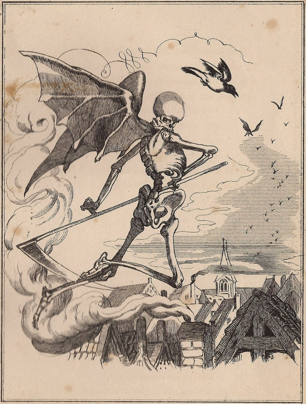 Illustrationen till sida 8 i Dödens Engel af Johan Olof Wallin, ny illustrerad upplaga 1851